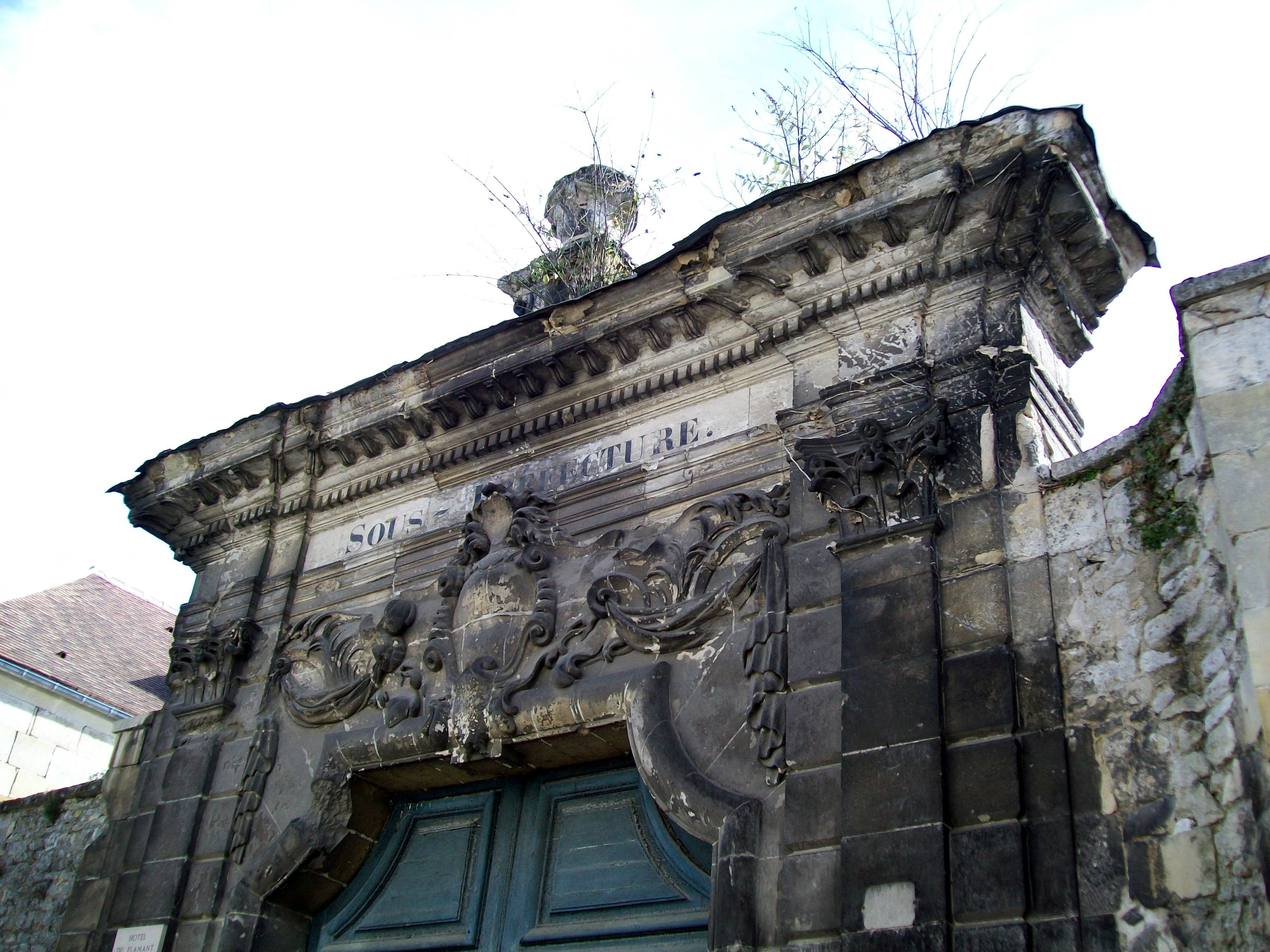 Hôtel du Flamant, porte cochère monumentale du XVIIe siècle sur la rue des Cordeliers. L'inscription nous indique l'une des utilisations passées du monument.